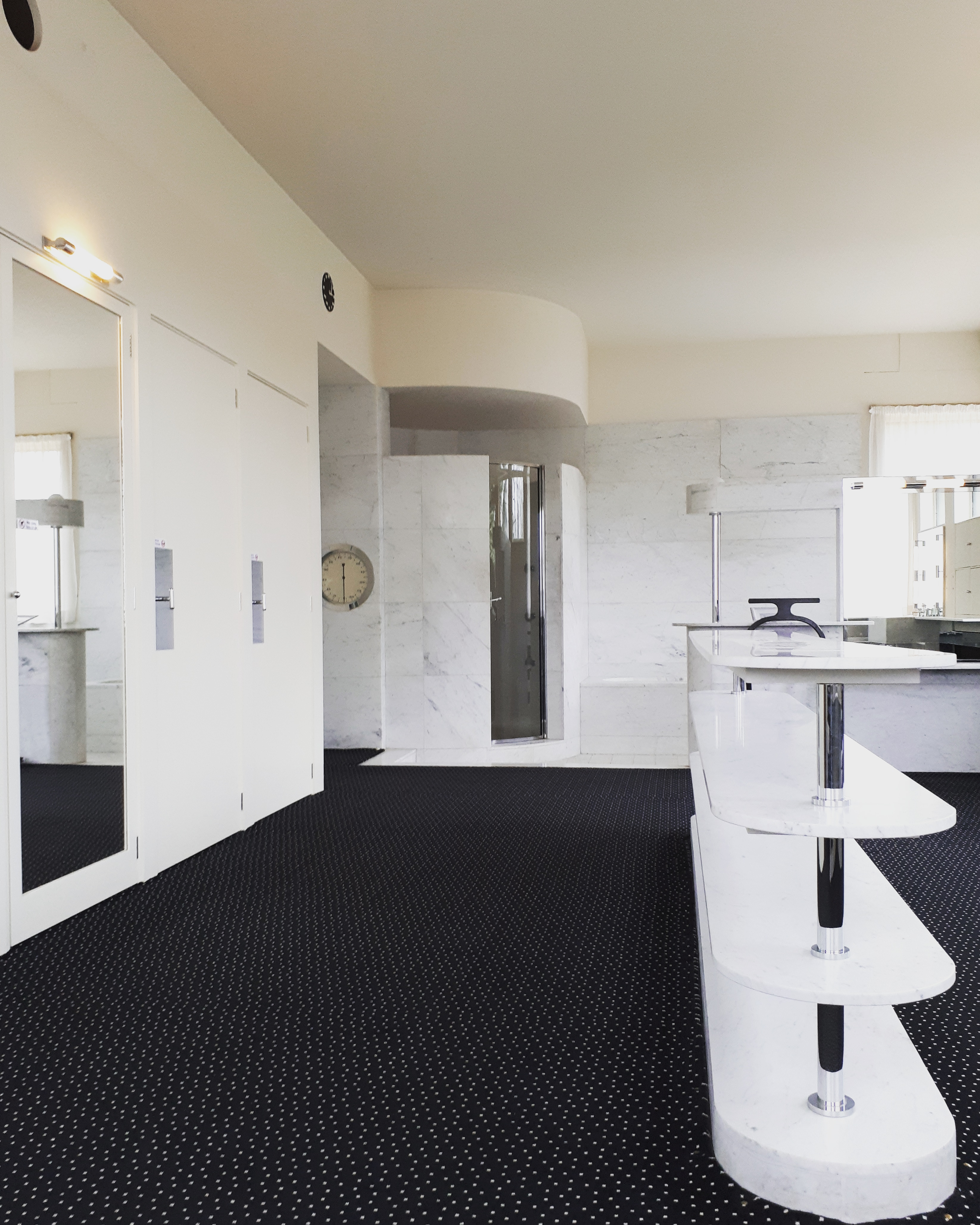 Villa Cavrois: la stanza da bagno dei genitori